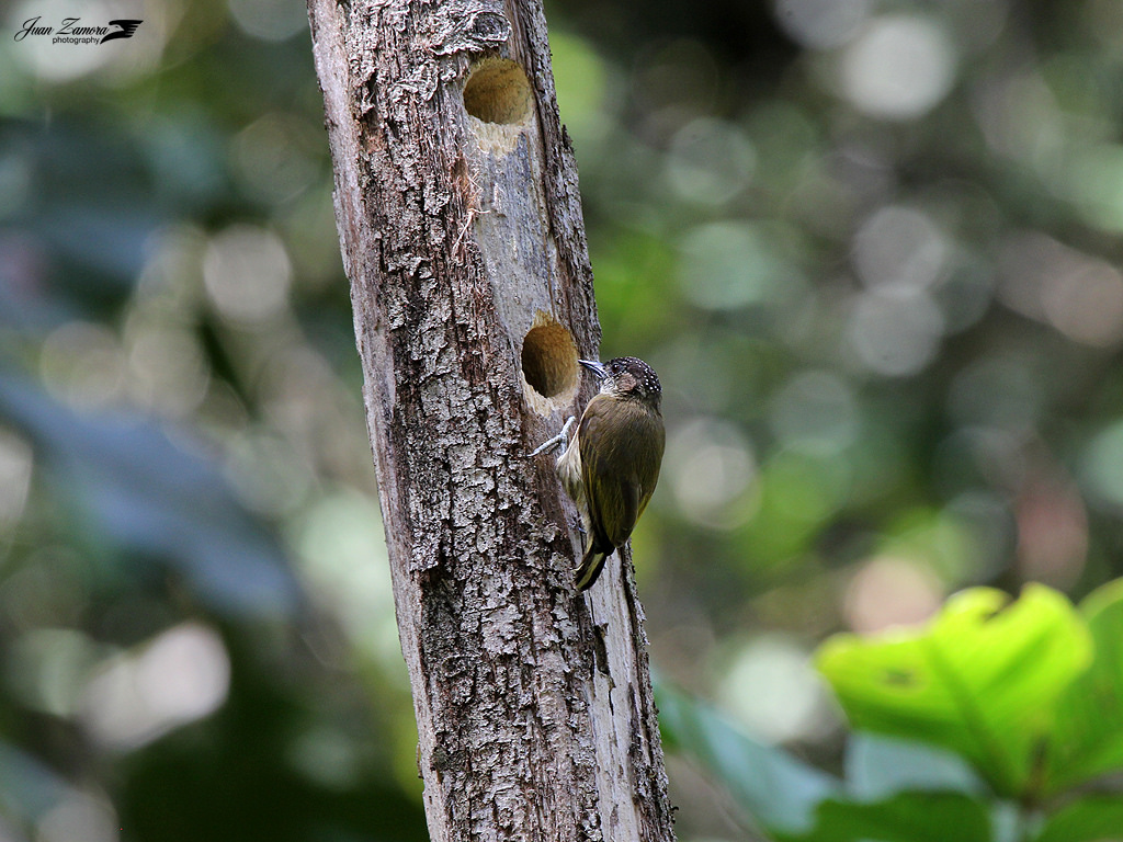 Los Cusingos, Perez Zeledon. Costa Rica